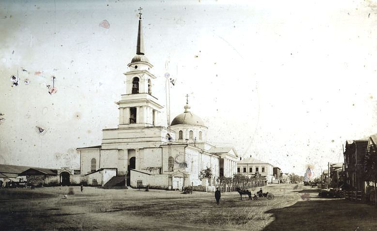 Благовещенского cобора в Воткинске